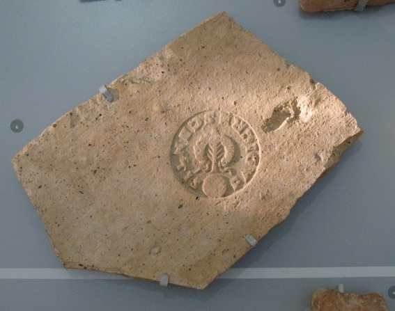 Tuile du toit du portique de Balbus, conservée au musée Crypta Balbi (Rome). Marque du fabricant FADIVS CRESCENS - CIL XV 1135 - IIe siècle ap. J.-C.